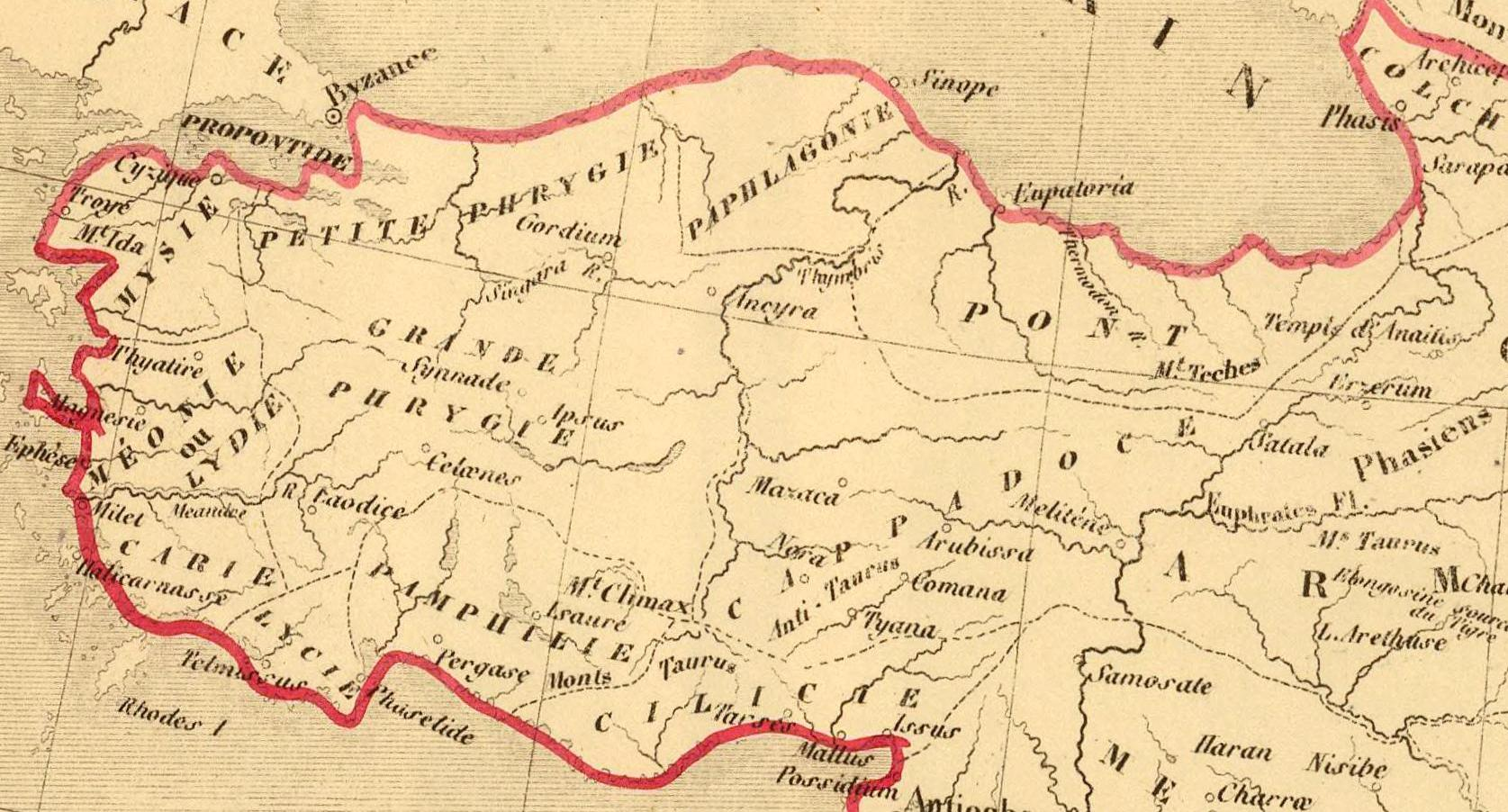 Carte de l'Empire des Perses. Pour servir a l'intelligence des livres d'Esdras, de Nehemias, de Tobie, de Judith, d'Esther, de Job et des Prophetes. Depuis 588 jusqu'a 536 avant J.C. epoque ou finit la captivite. Dressee sous la direction de A. Houze. (In upper margin:) Atlas histque. (et) geogque. de la Terre Sainte. Carte VIII. (Paris, Chez P. Dumenil, editeur, rue des Beaux-Arts, 10. 1844)